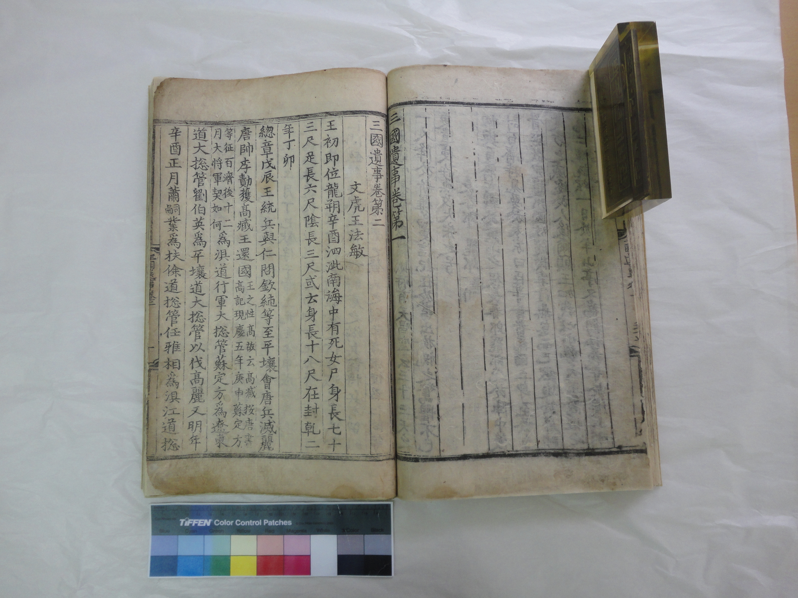 국보 제306-3호 삼국유사 권1~2 (三國遺事 卷一~二)